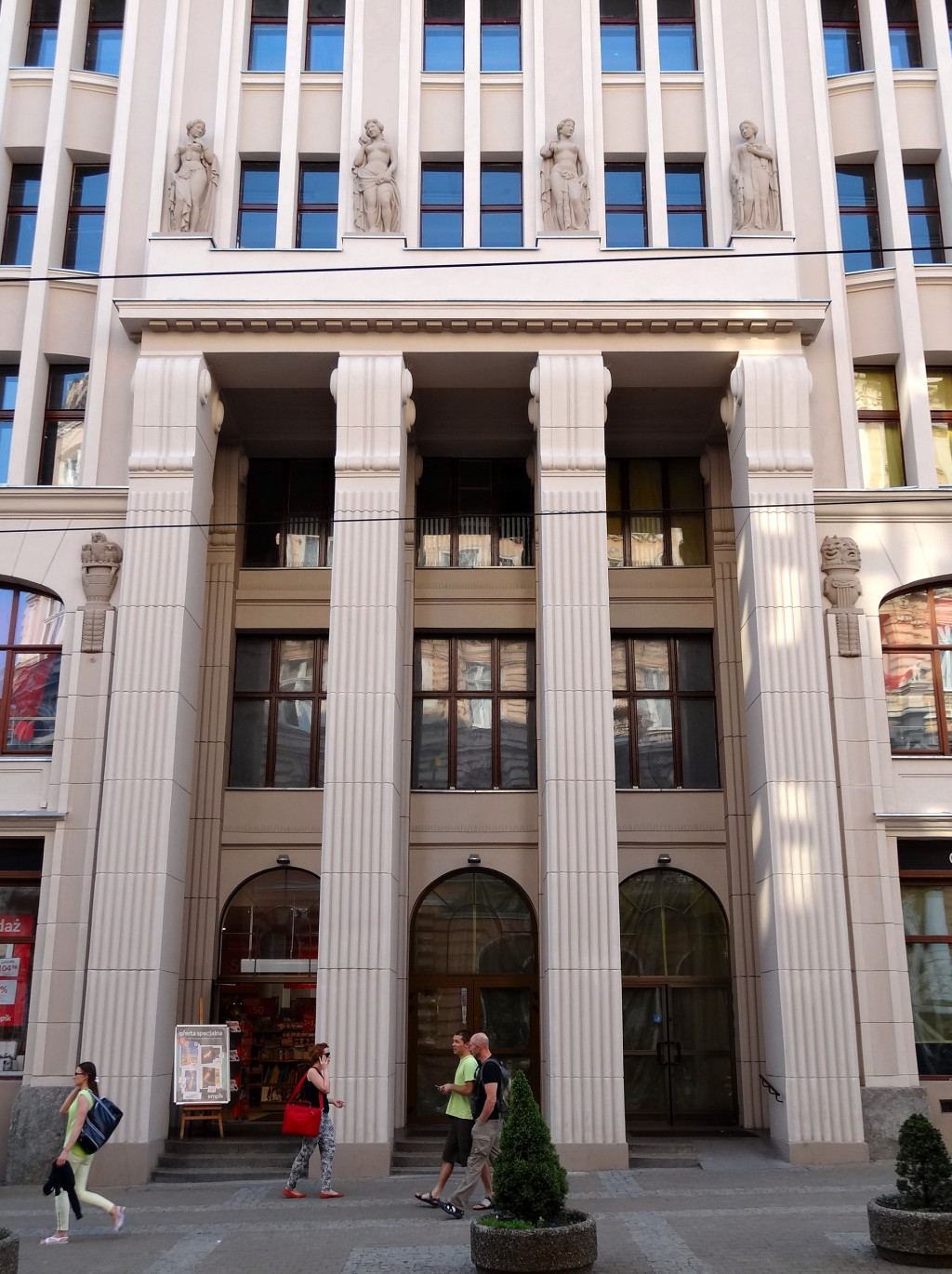 Dom Towarowy Jedynak, ul. Gdańska 15 w Bydgoszczy (zbud. 1910)